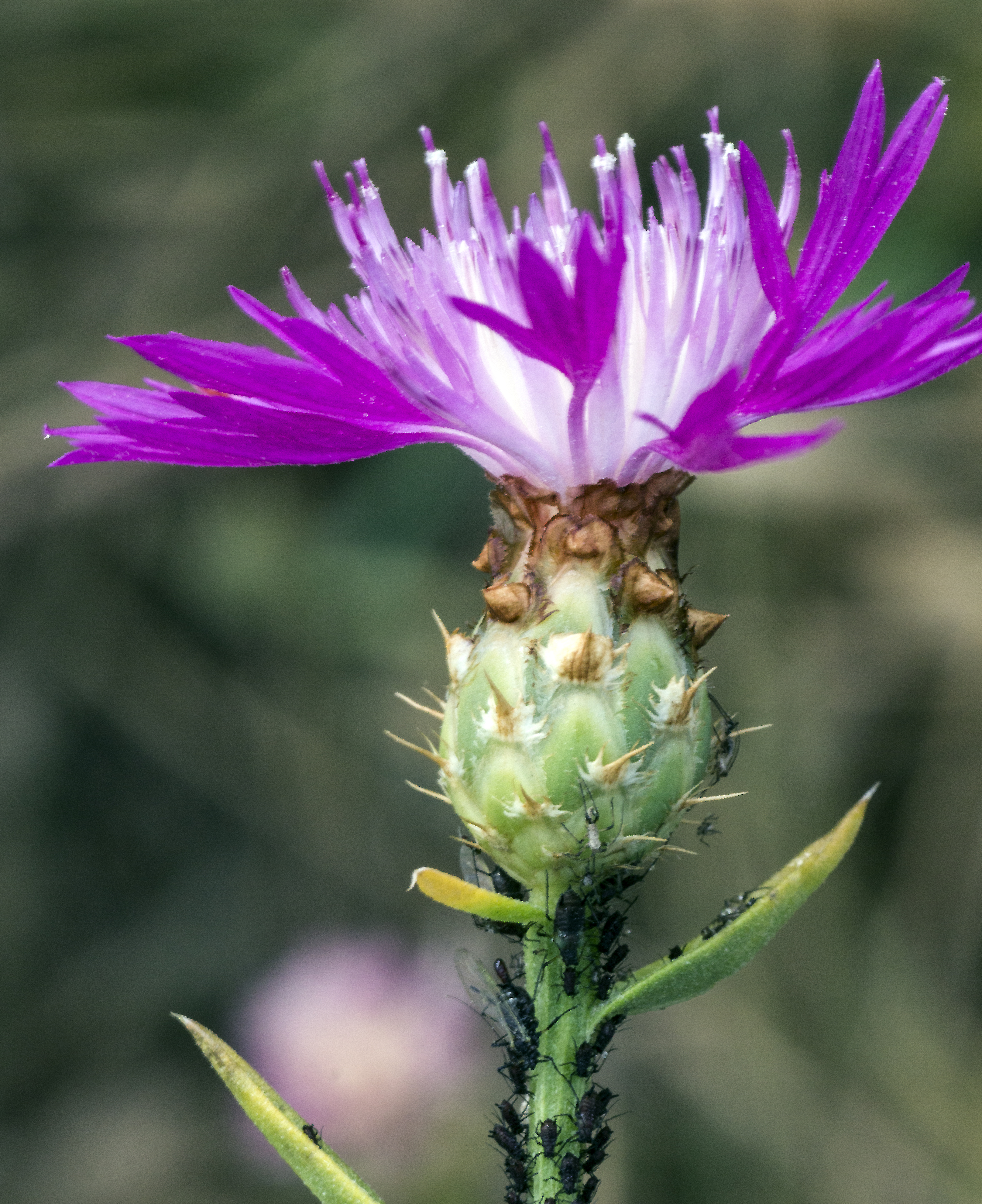 Centaurea diluta. Cerro del Humo (37.548916,-4.640892). Montilla (Córdoba). 09-VI-2013